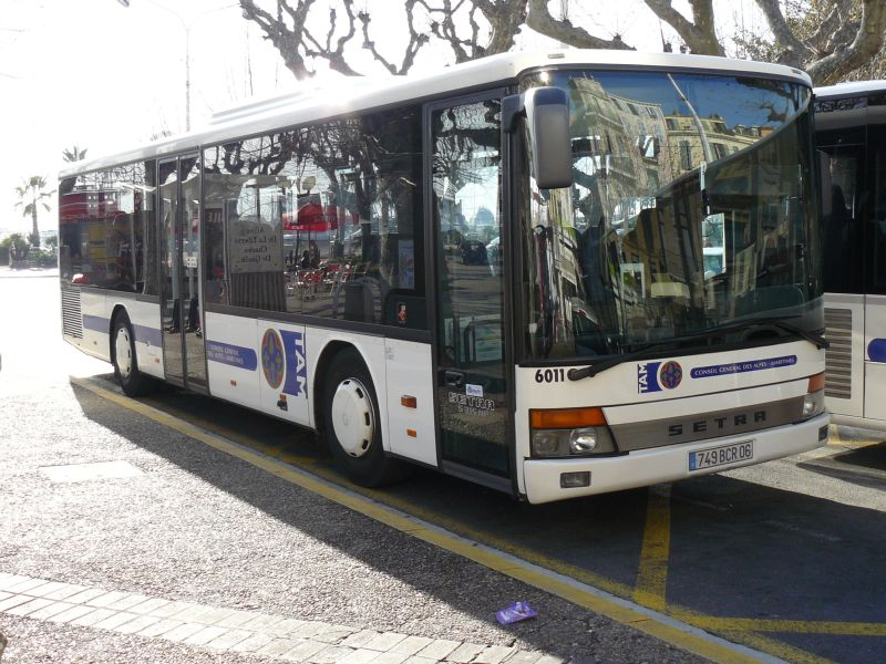 Bus du Conseil Général des Alpes-Maritimes, effectuant le trajet Cannes-Nice, en partie sur la route du bord de mer